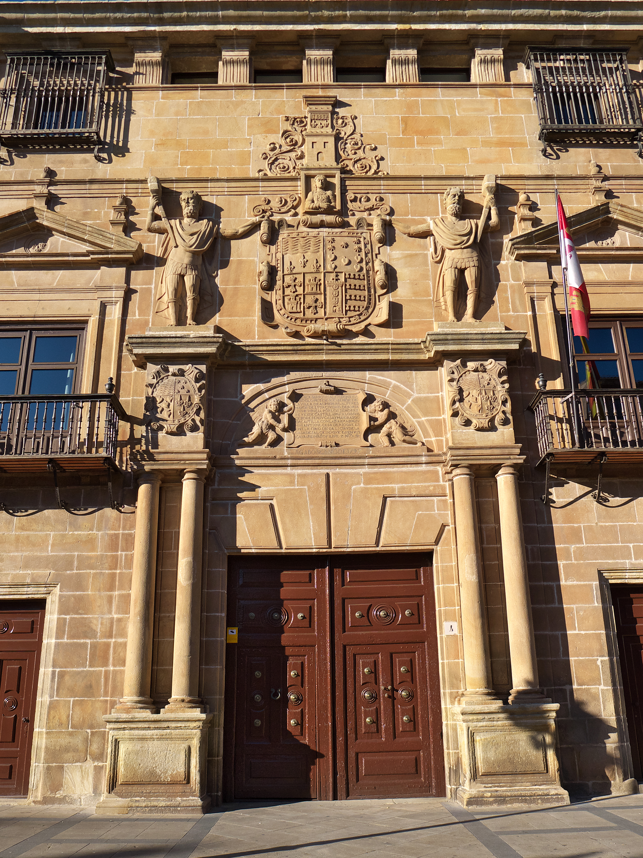 El principal palacio renacentista de Soria